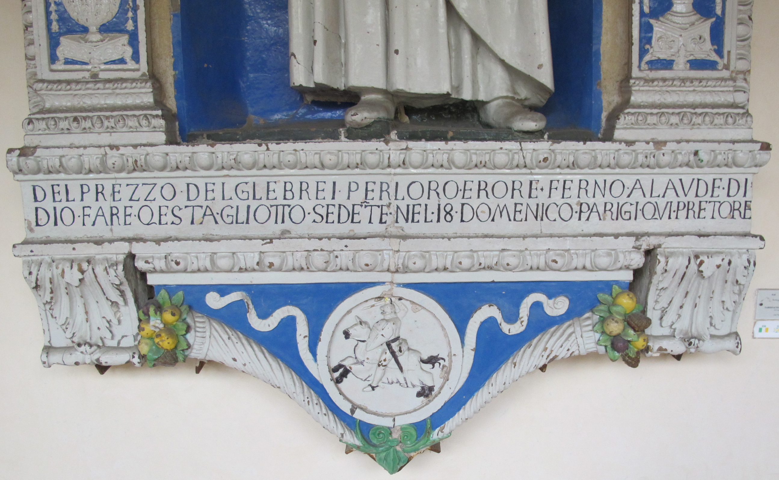 Andrea della robbia (bottega), tabernacolo con madonna col bambino, 1518, da palazzo pretorio di empoli 02 ebrei